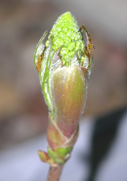 Acer pseudoplatanus